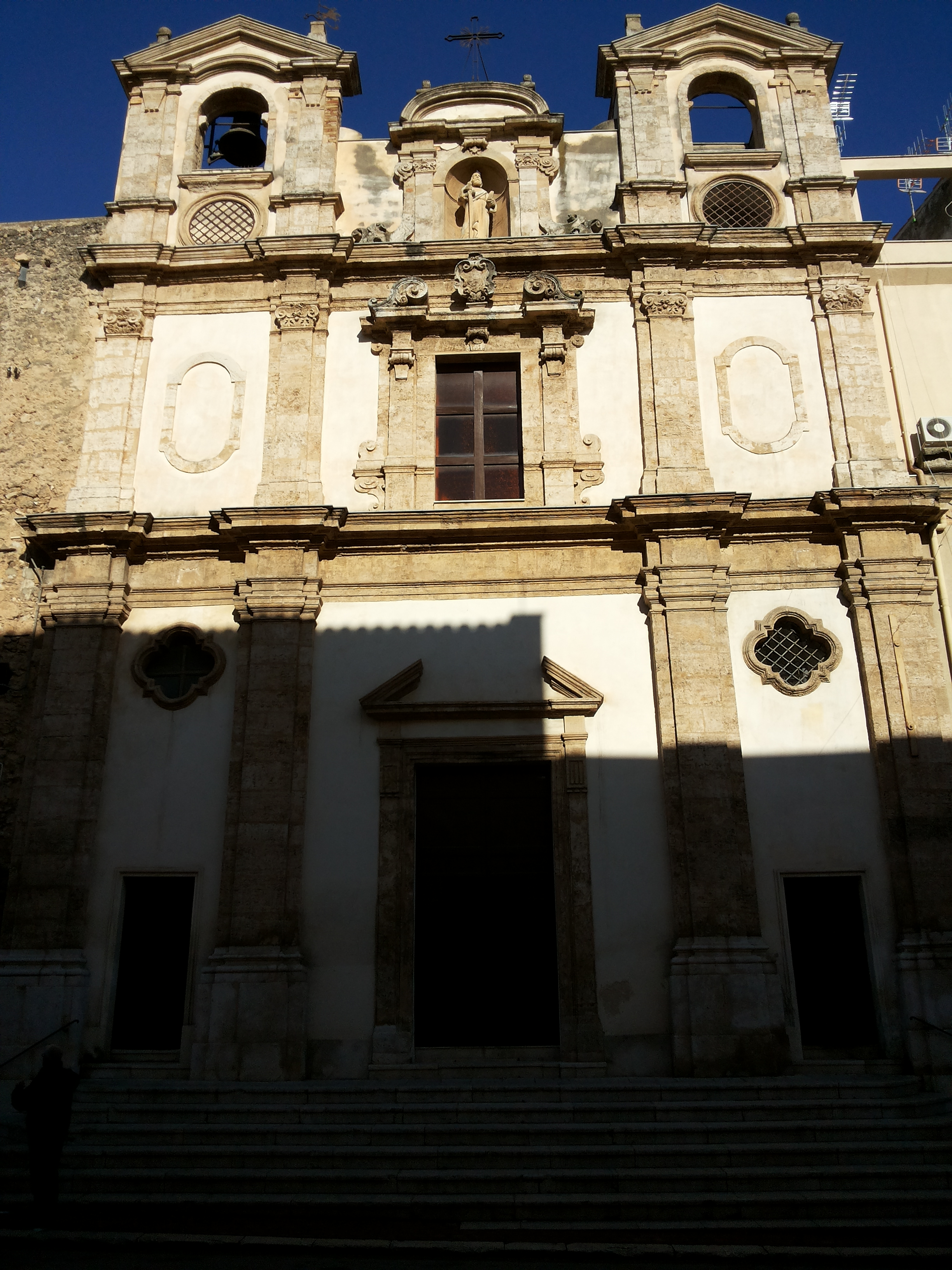 Chiesa dei Santi Paolo e Bartolomeo (Alcamo) - Facciata